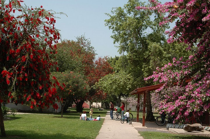 נוי בקיבוץ אשדות יעקב איחוד